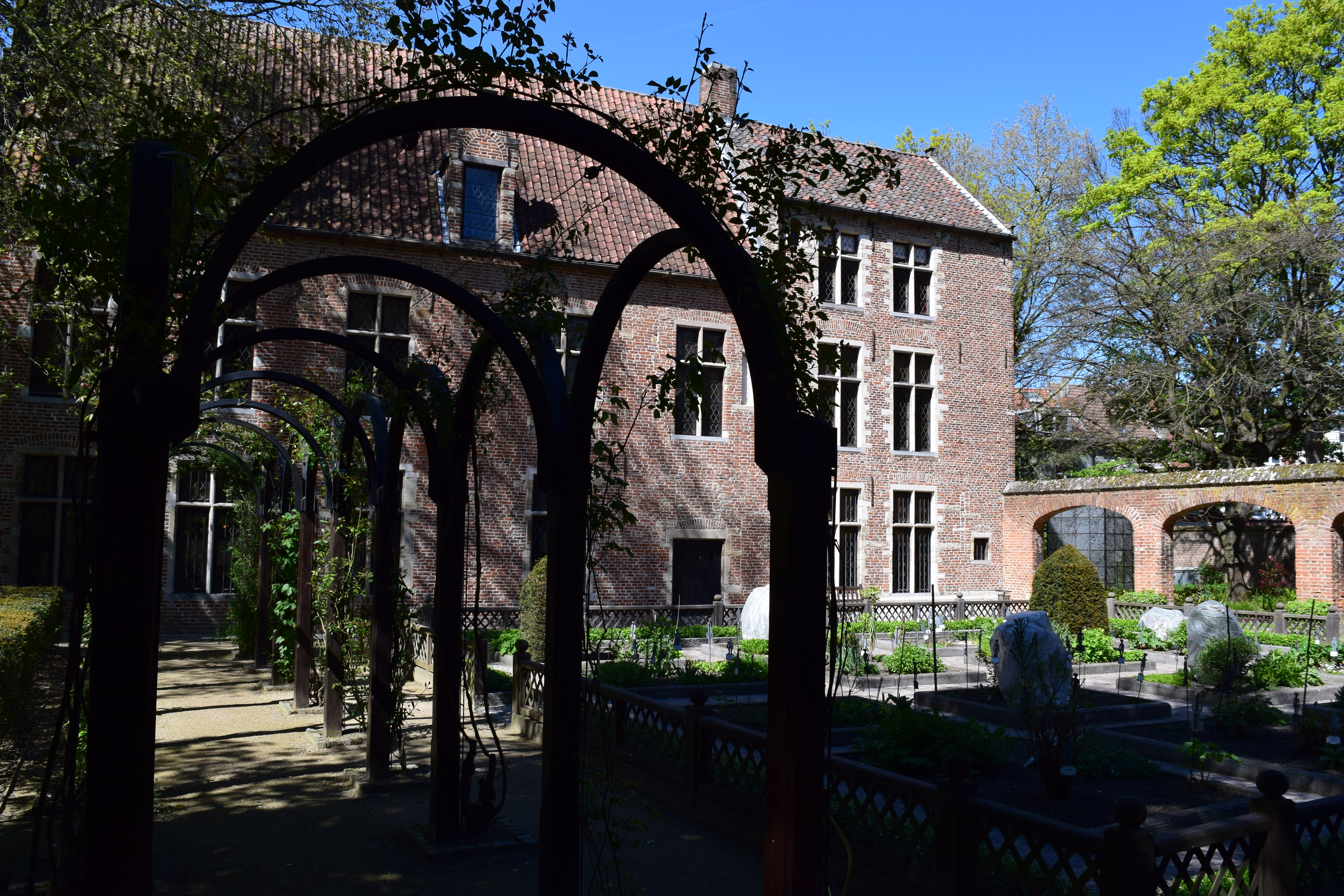 Jardin des maladies- maison Erasme à Anderlecht